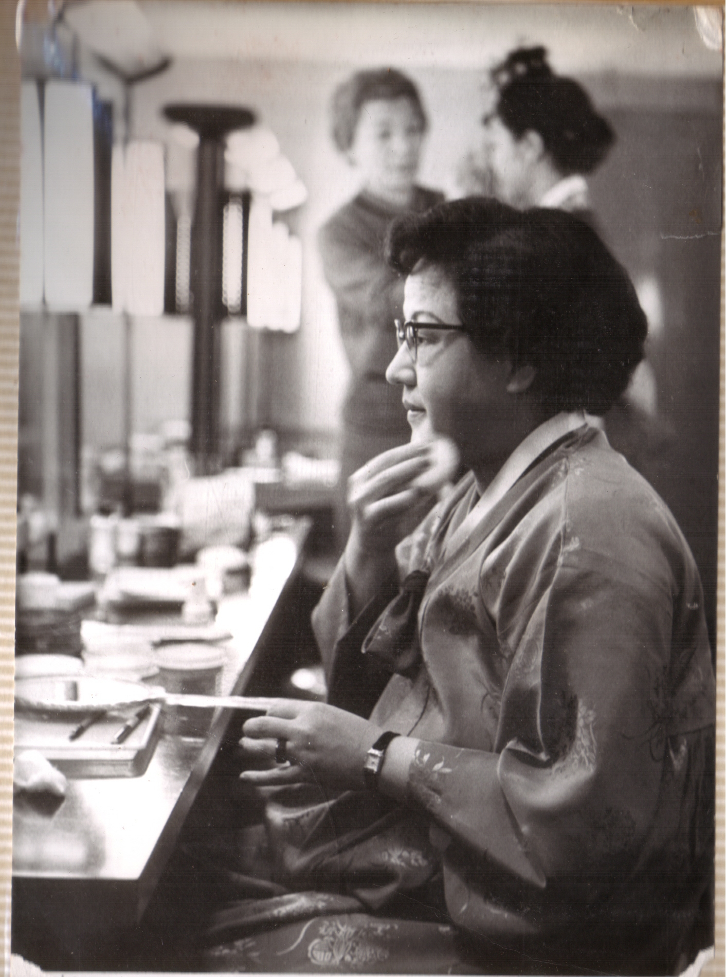 권정희 여사. 일본 후지TV 출연. 한국궁중머리 소계